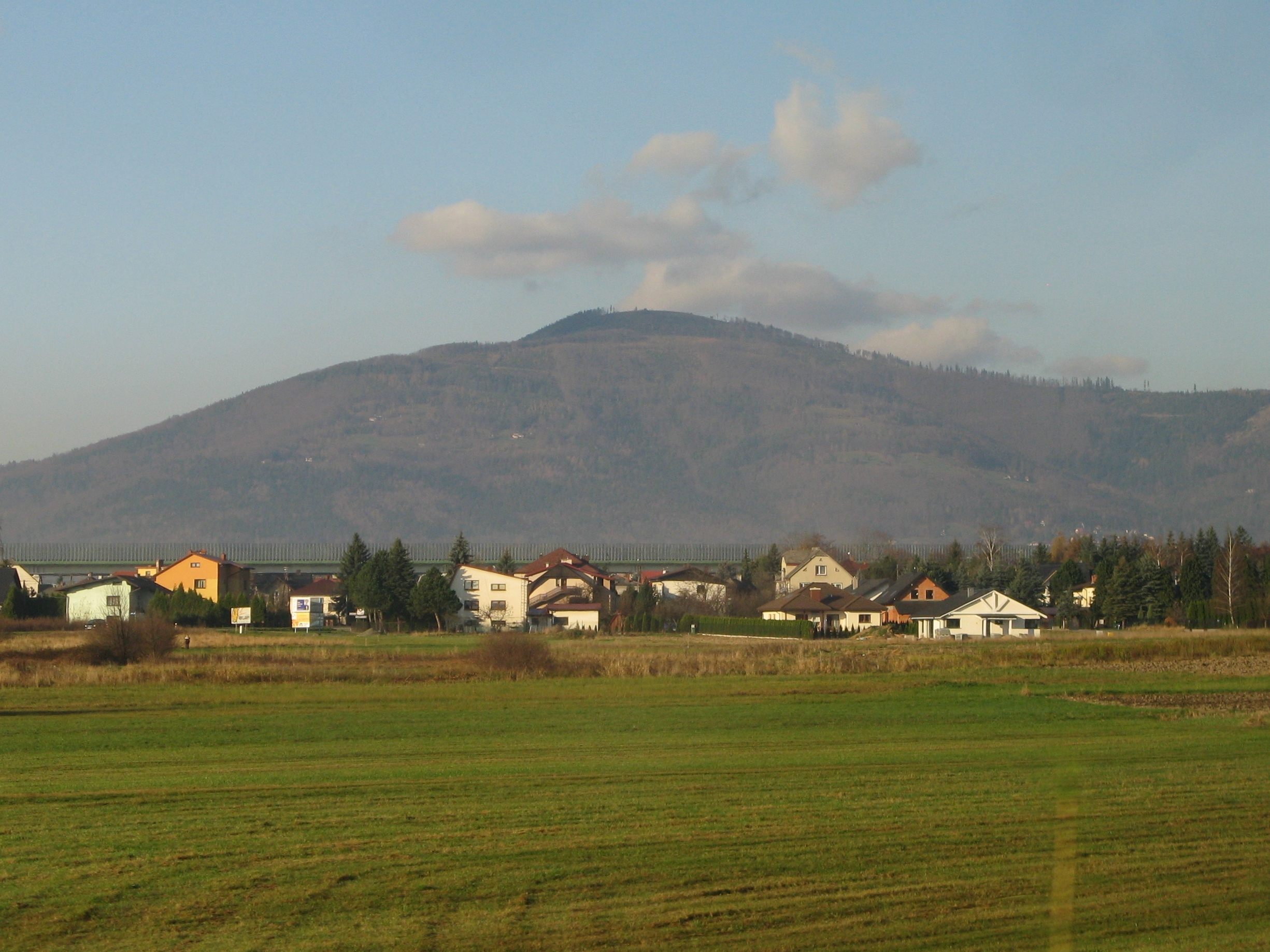 Magura (1109 m n.p.m.) koło Klimczoka widziana z okna pociągu w Łodygowicach.